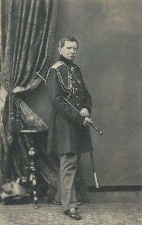 Граф Серге́й Па́влович Сумаро́ков (1793—1875)